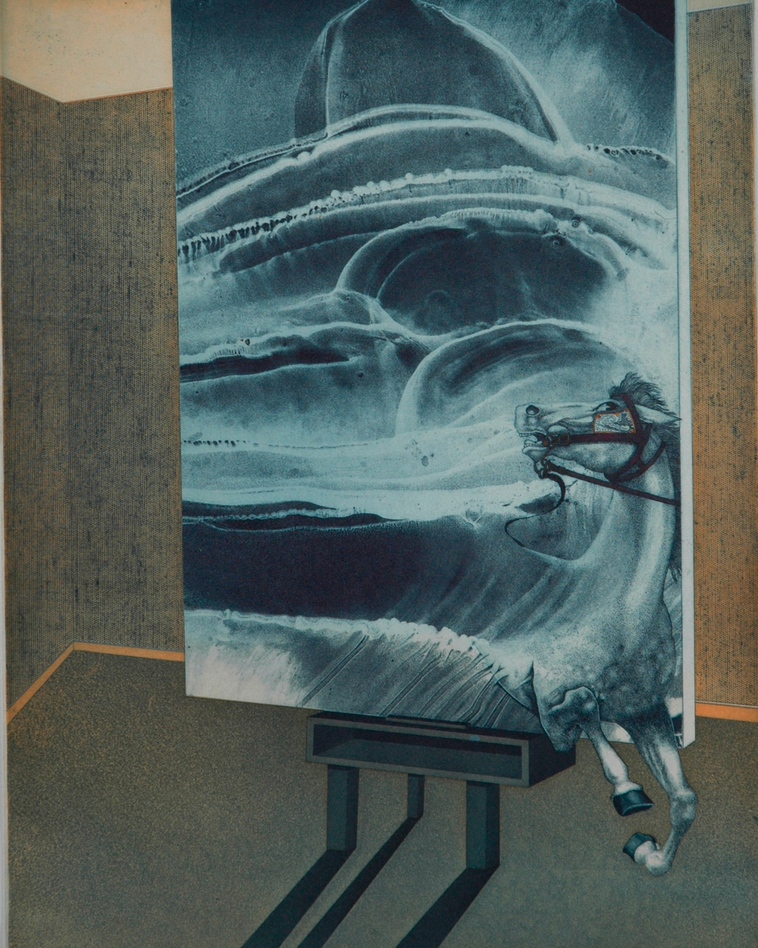 Ebrahim Ehrari, Herausgesprungen, Farbradierung, 46x36cm